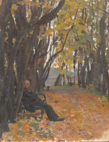 Серов Валентин Александрович Владимир Дмитриевич Дервиз на скамье Период создания: 1892-1893 Материал, техника: картон, масло Размер: 24*18,5 Место создания: — Номер в Госкаталоге: 4369627 Номер по ГИК (КП): п.32751 Инвентарный номер: Ж-500 Местонахождение Федеральное государственное бюджетное учреждение культуры "Всероссийское музейное объединение "Государственная Третьяковская галерея"